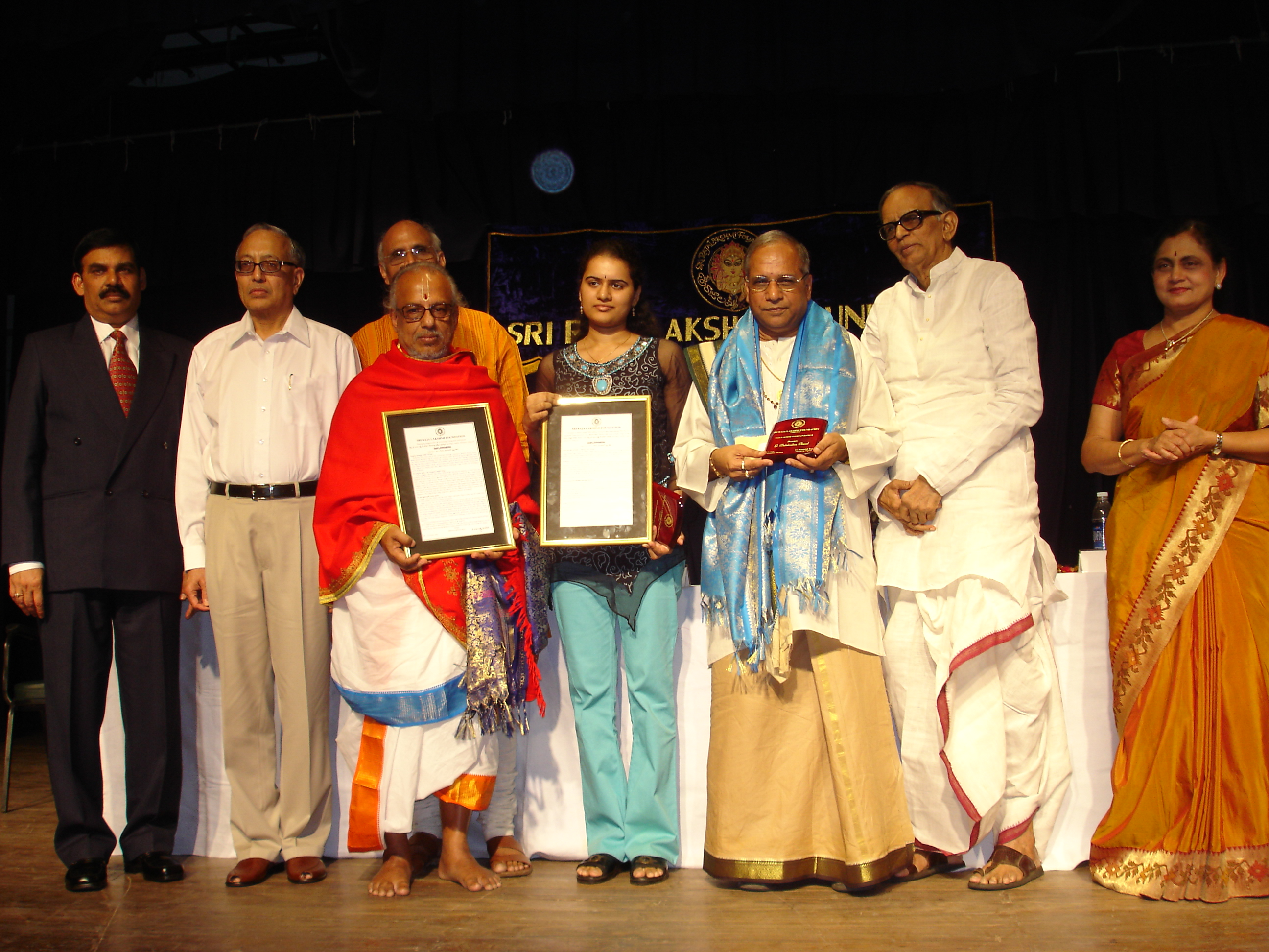 L to R : Sri R.Sekar IPS, Sri N.Murali, Dr.Pappu Venugopala Rao, Sri R.Venkatraman Ghanapaati, Ms.Koneru Humpy, Sri Balakrishna Prasad, Sri B.S.R.Krishna, Dr.Janani Krishna